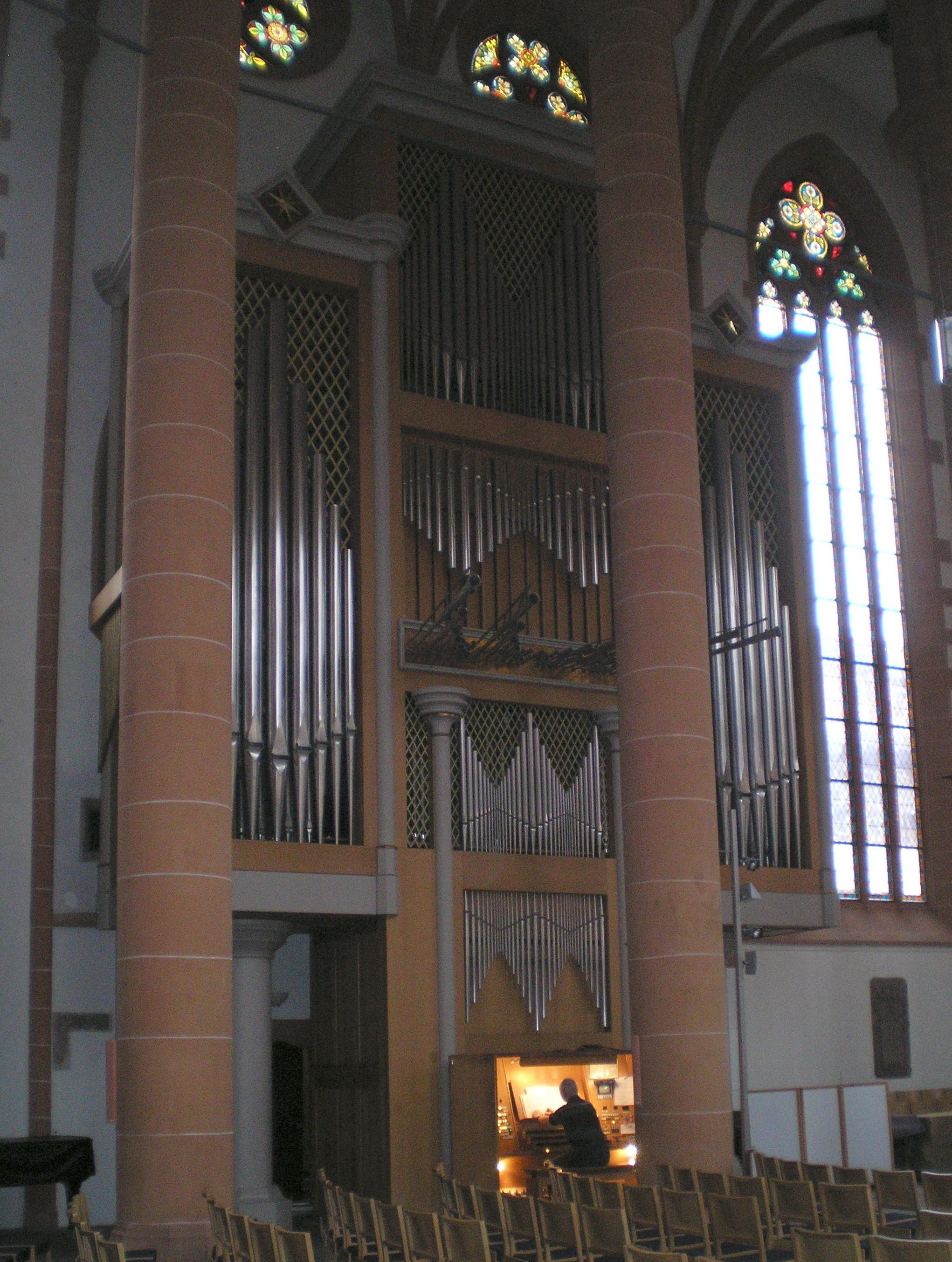 Die Orgel in der Heiliggeistkirche in Heidelberg.